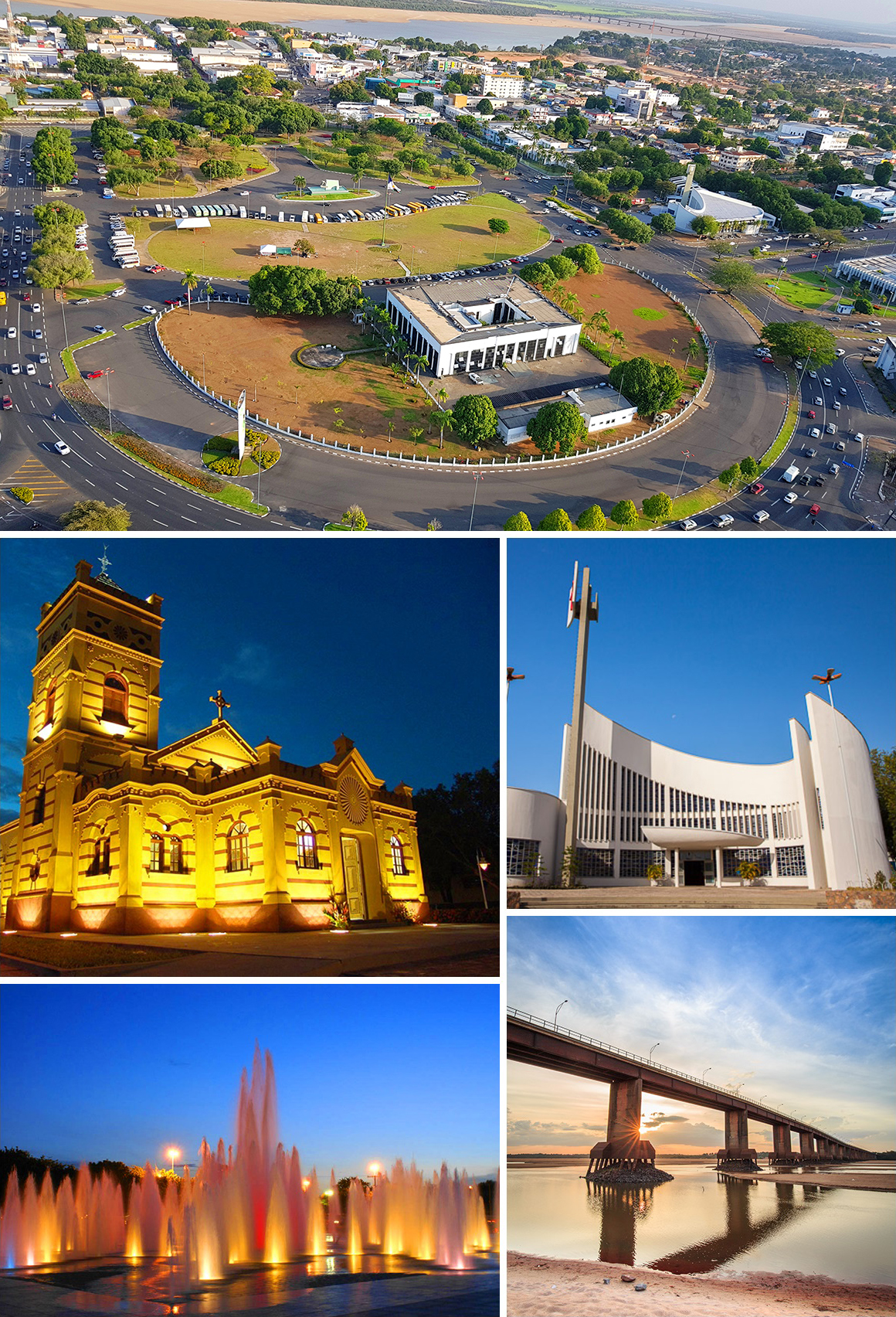 Montagem com as melhores fotos de uso livre de Boa Vista RR